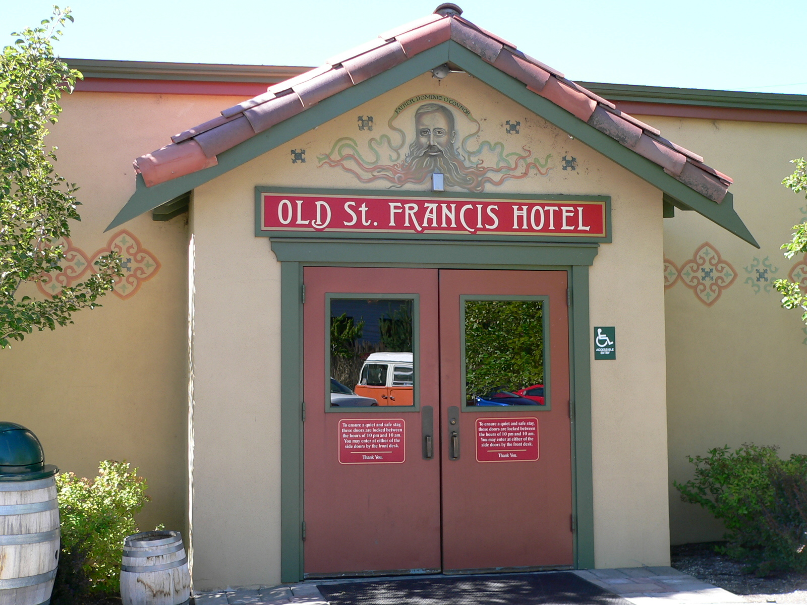 Old St. Francis Hotel in Bend, Oregon in 2007